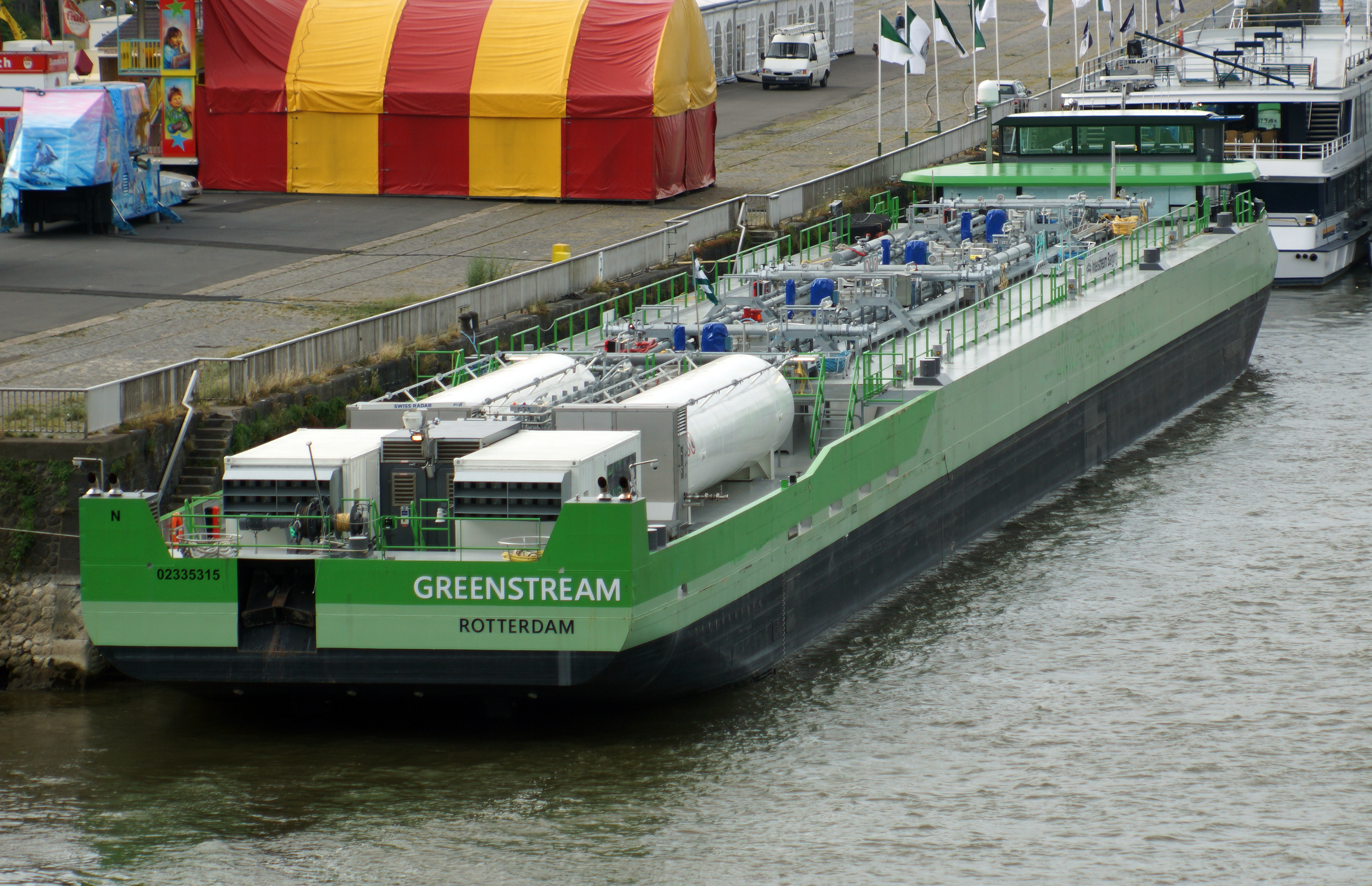 Das mit Flüssigerdgas angetriebene Tankmotorschiff Greenstream in Köln-Deutz.